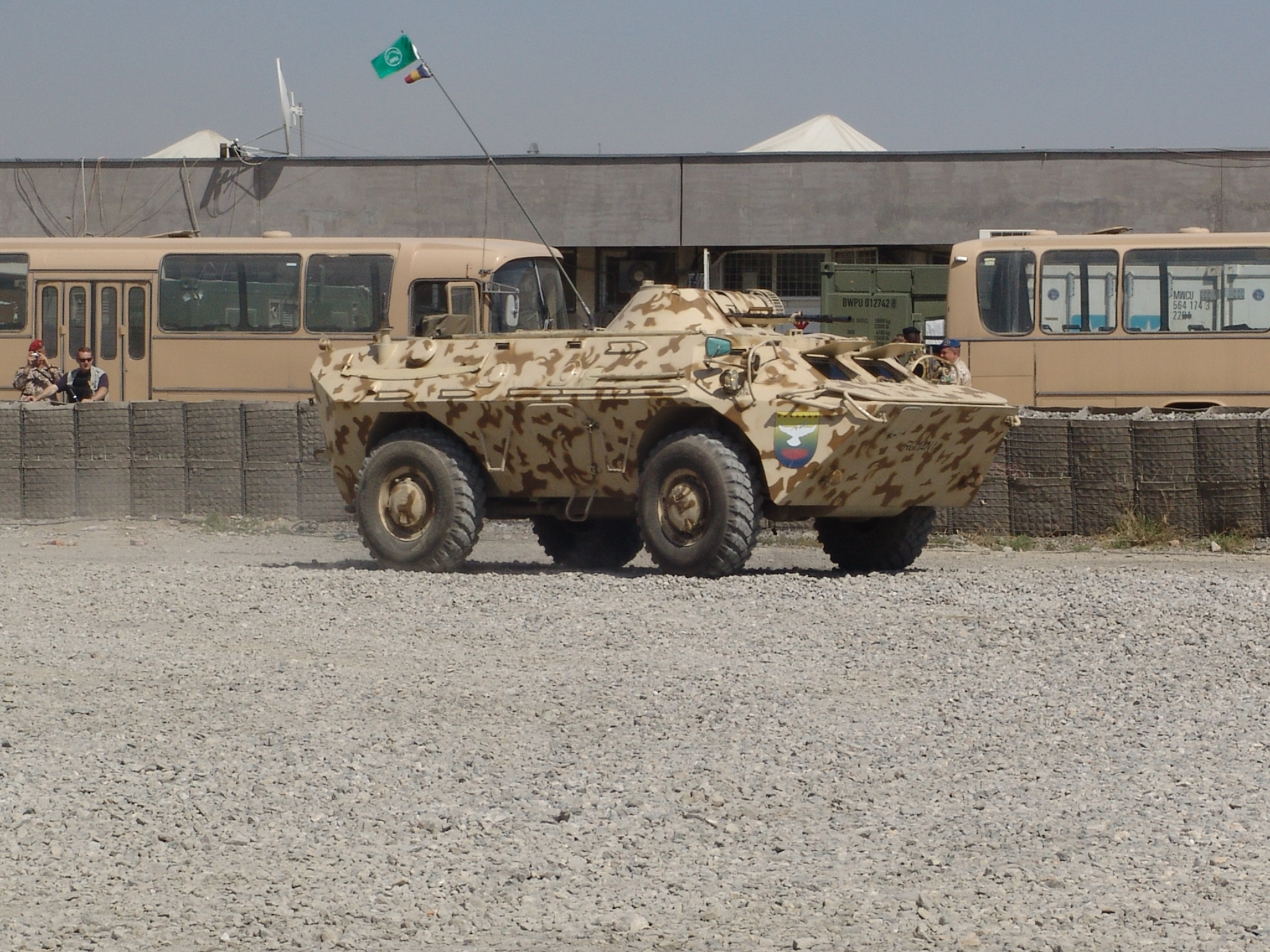 TABC-79 in Afghanistan.